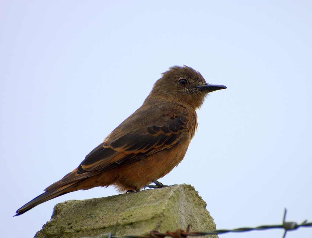 Cliff Flycatcher (Hirundinea ferruginea) Estrada municipal "Sete Barras/Juquiá" no Vale do Ribeira